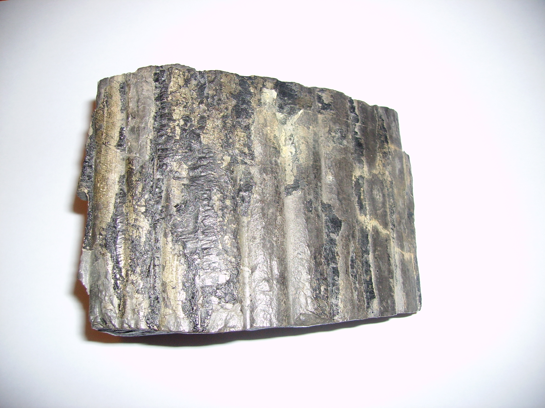 Fossil Sigillaria